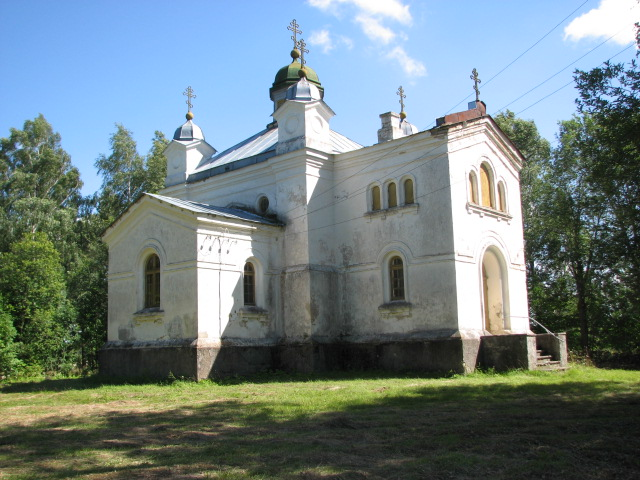 Prophet Elias Church in Mustjala, Saaremaa, Estonia